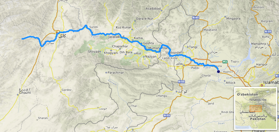 carte réalisée sur umap, [1] This map may be incomplete, and may contain errors. Don't rely solely on it for navigation.